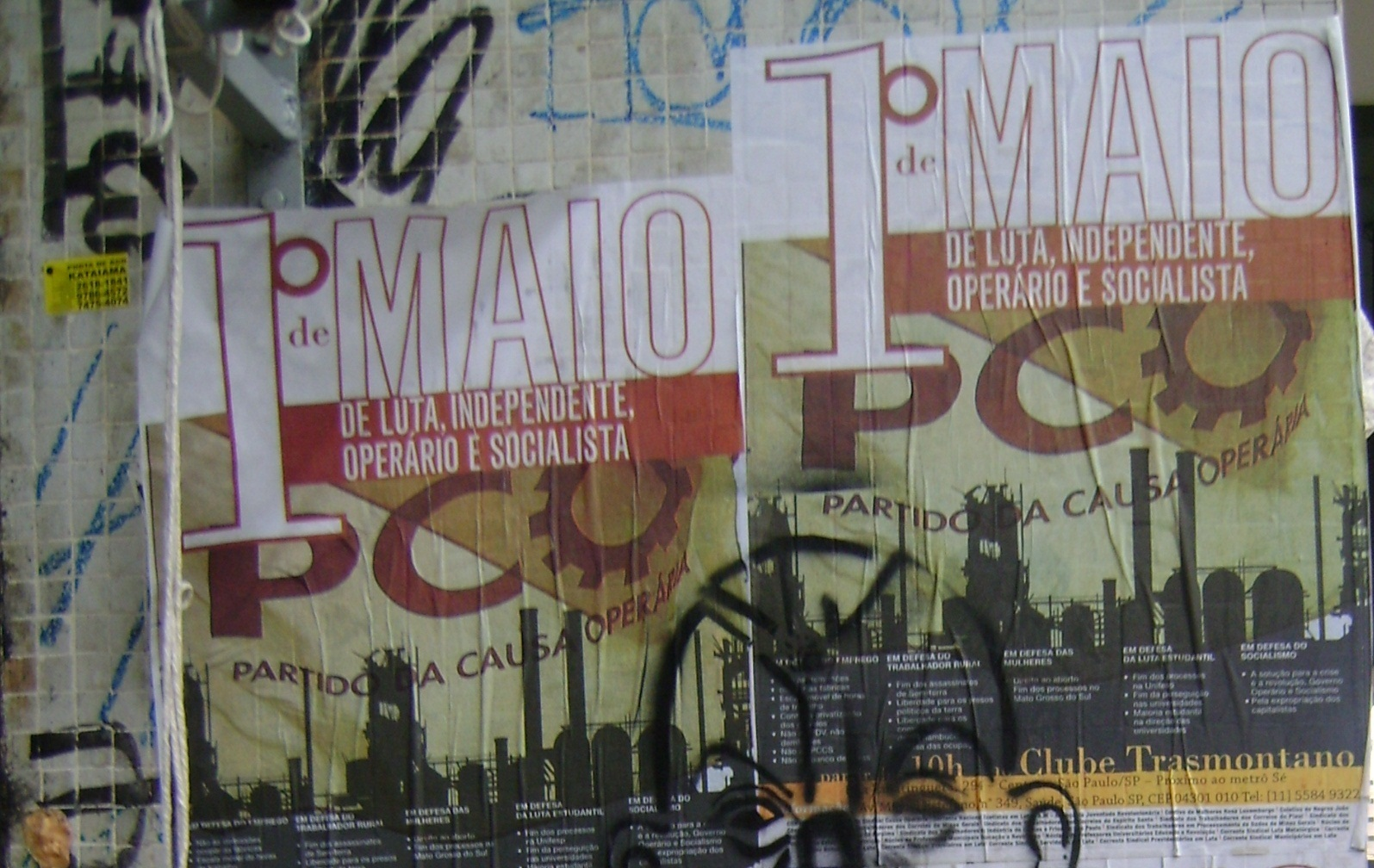 Carteles electorales del Partido de la Causa Obrera (Brasil)